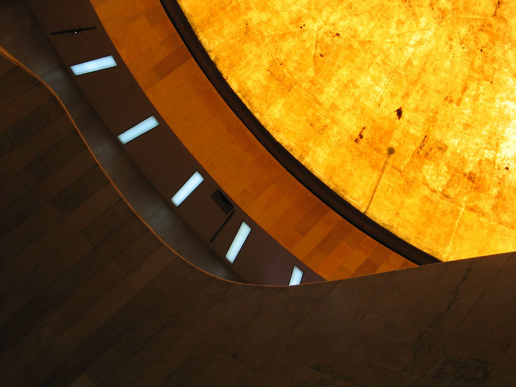 Museo de Arte Moderno. México